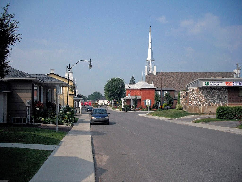 Vue sur la ville de St-Roch-de-l'Achigan, près du croisement des routes 339 et rue St-Germain.